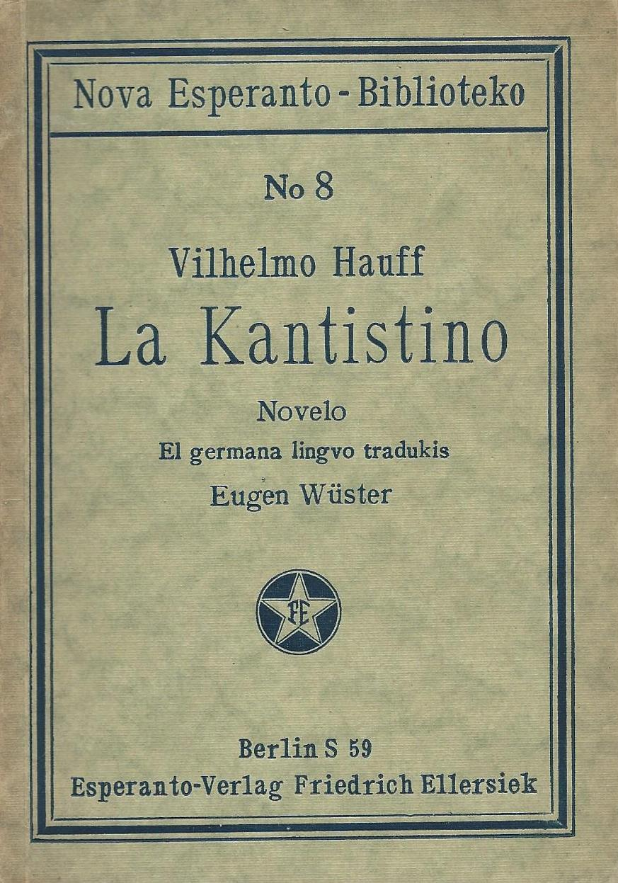 kovrilo de "La Kantistino", 1921